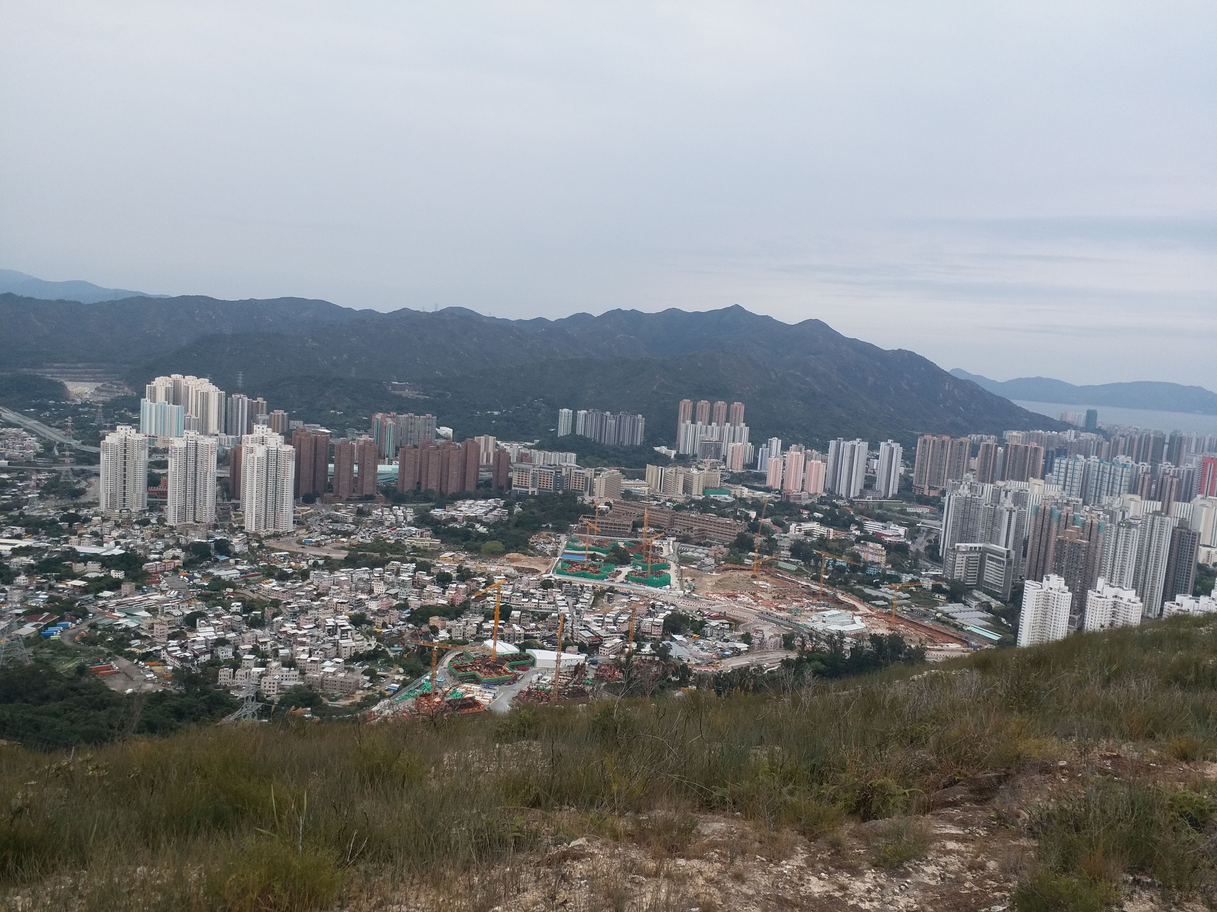 從圓頭山遠眺九逕山